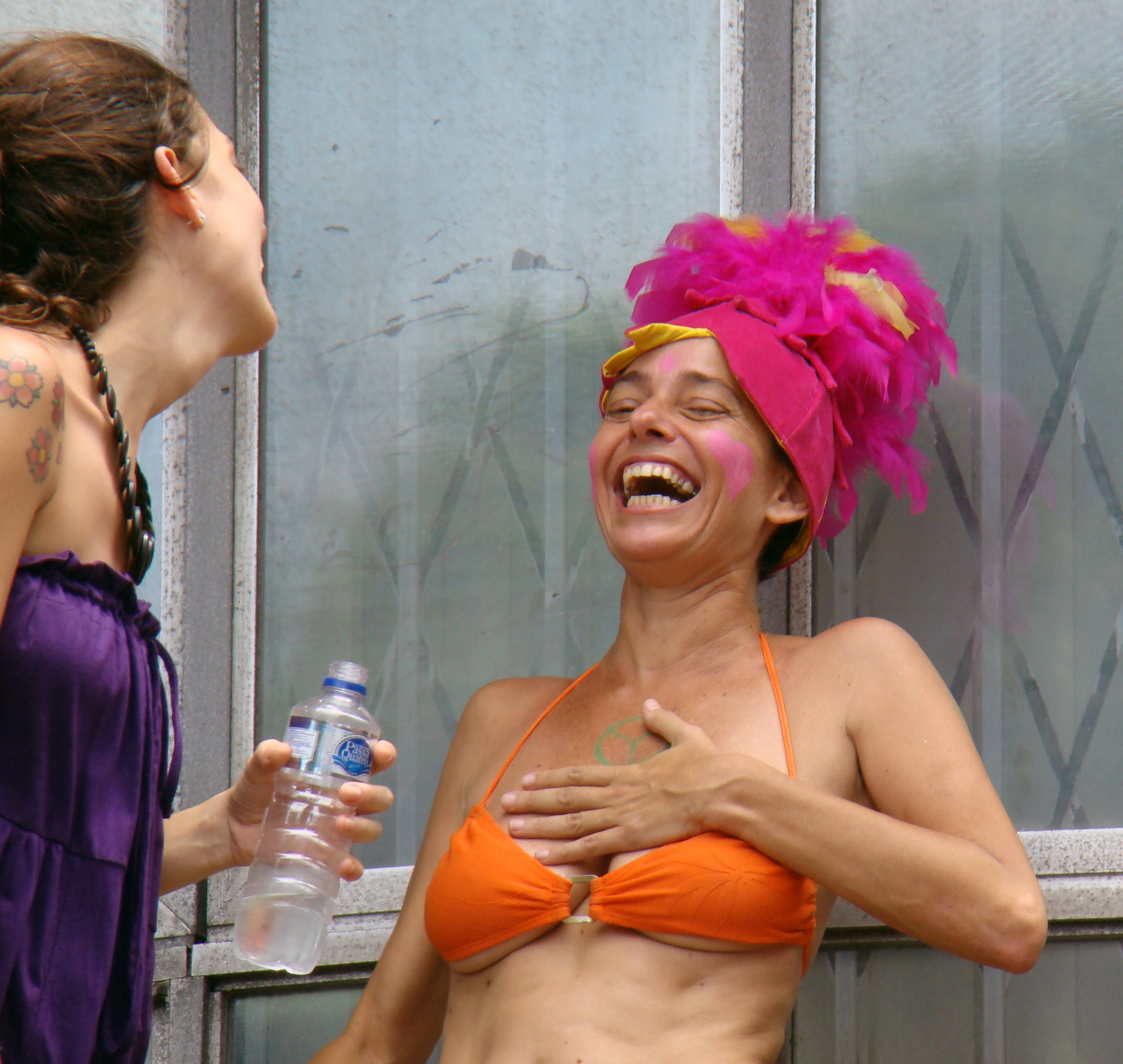 Bloco de Carnaval na Praça XV, Rio de Janeiro, Brasil.